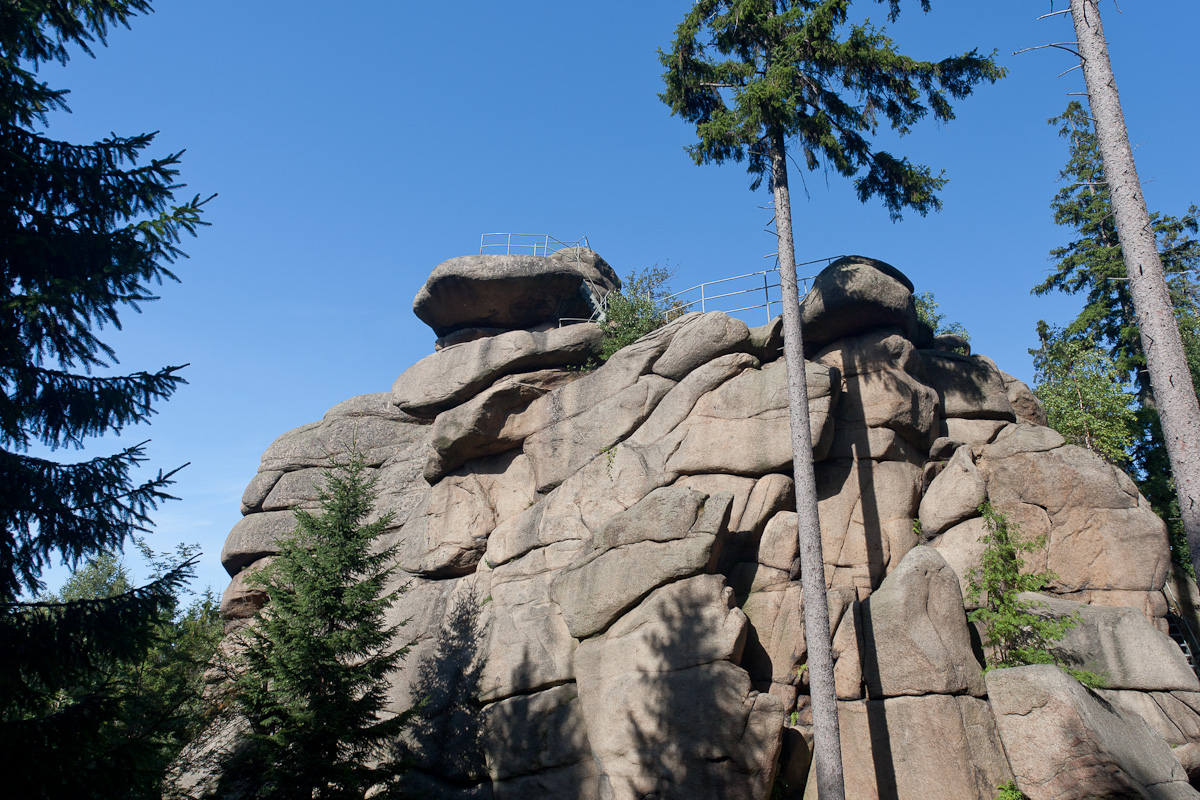 Ottofelsen bei Wernigerode / Harz